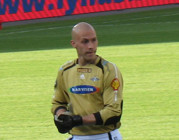 Fotballspilleren Lars Hirschfeld